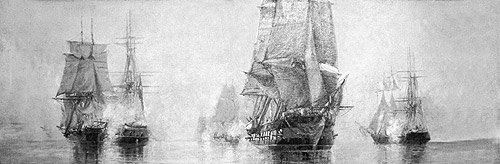 Combate naval de Islay